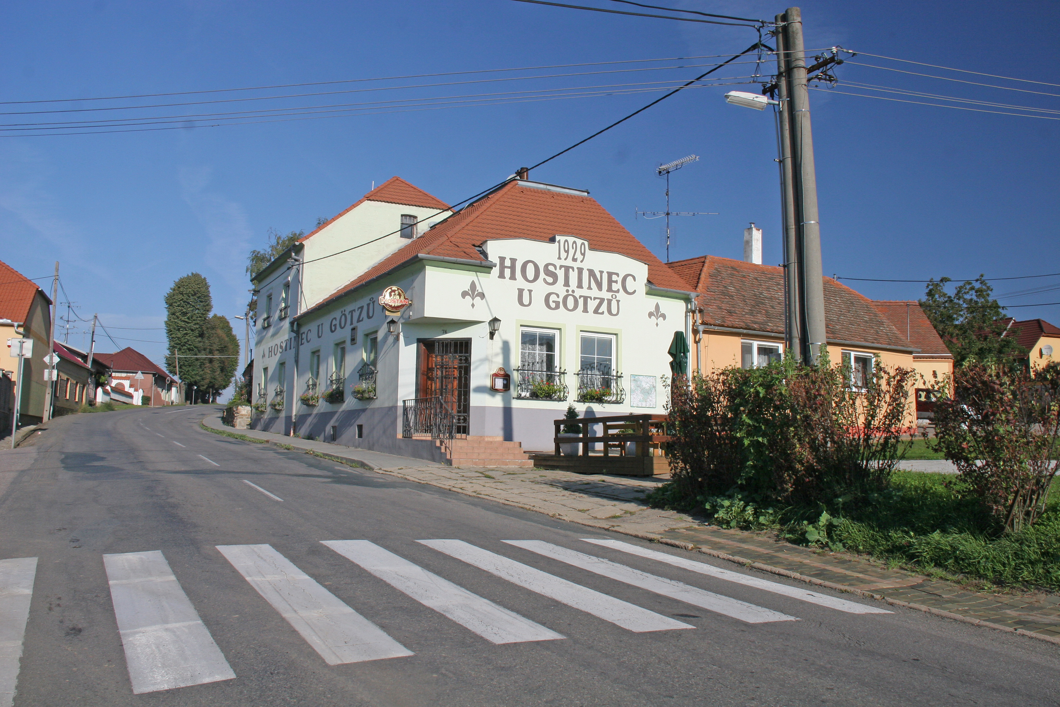 Citonice hostinec